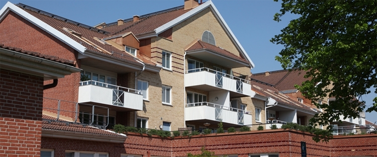 Tingsbacken 1, byggt 1993 av Norén Fastigheter.